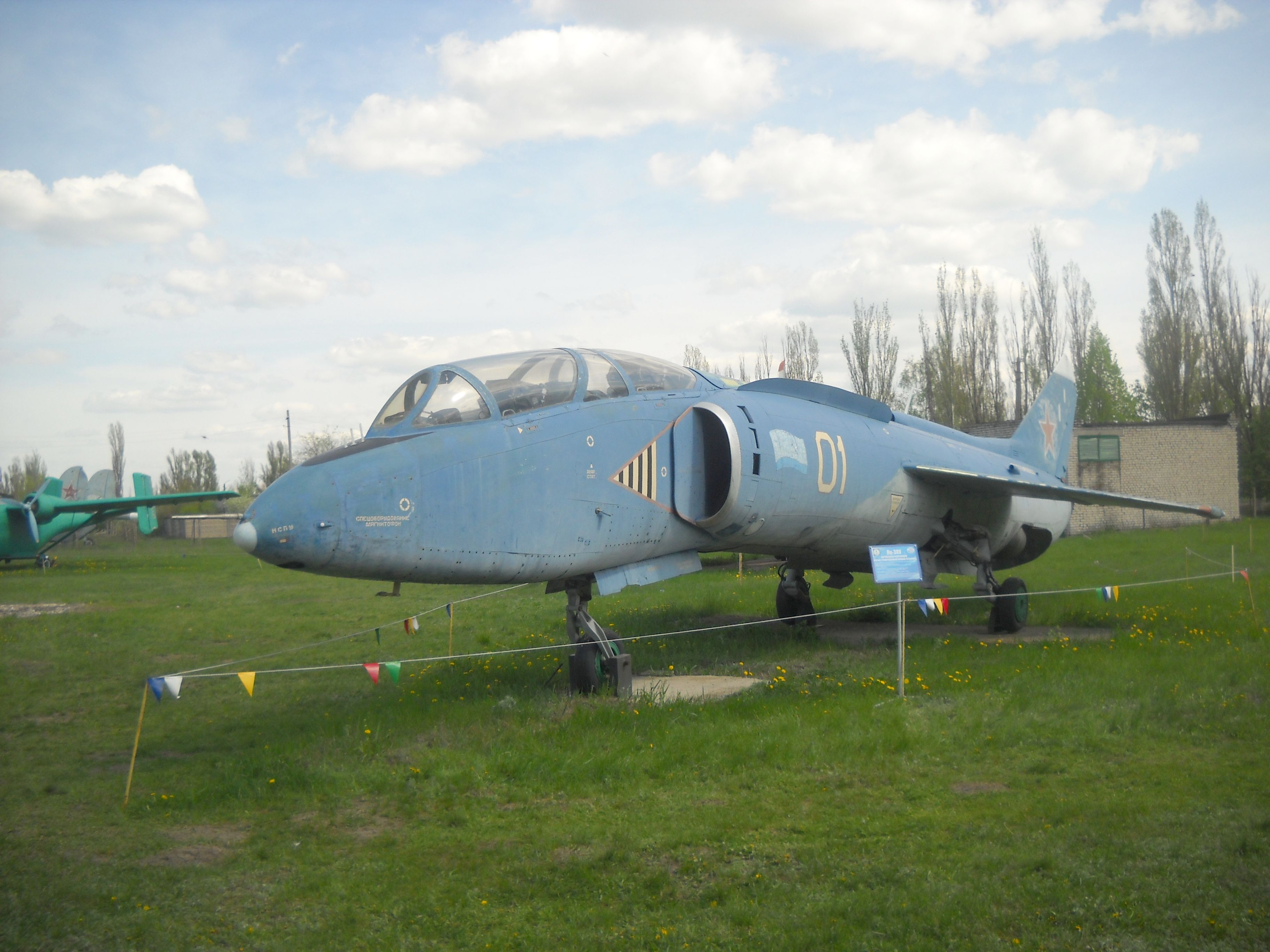 Як-38 в музее Луганского авиаремонтного завода (Украина)